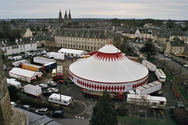 Vue aérienne de la place Gauquelin Despallière lors du festival